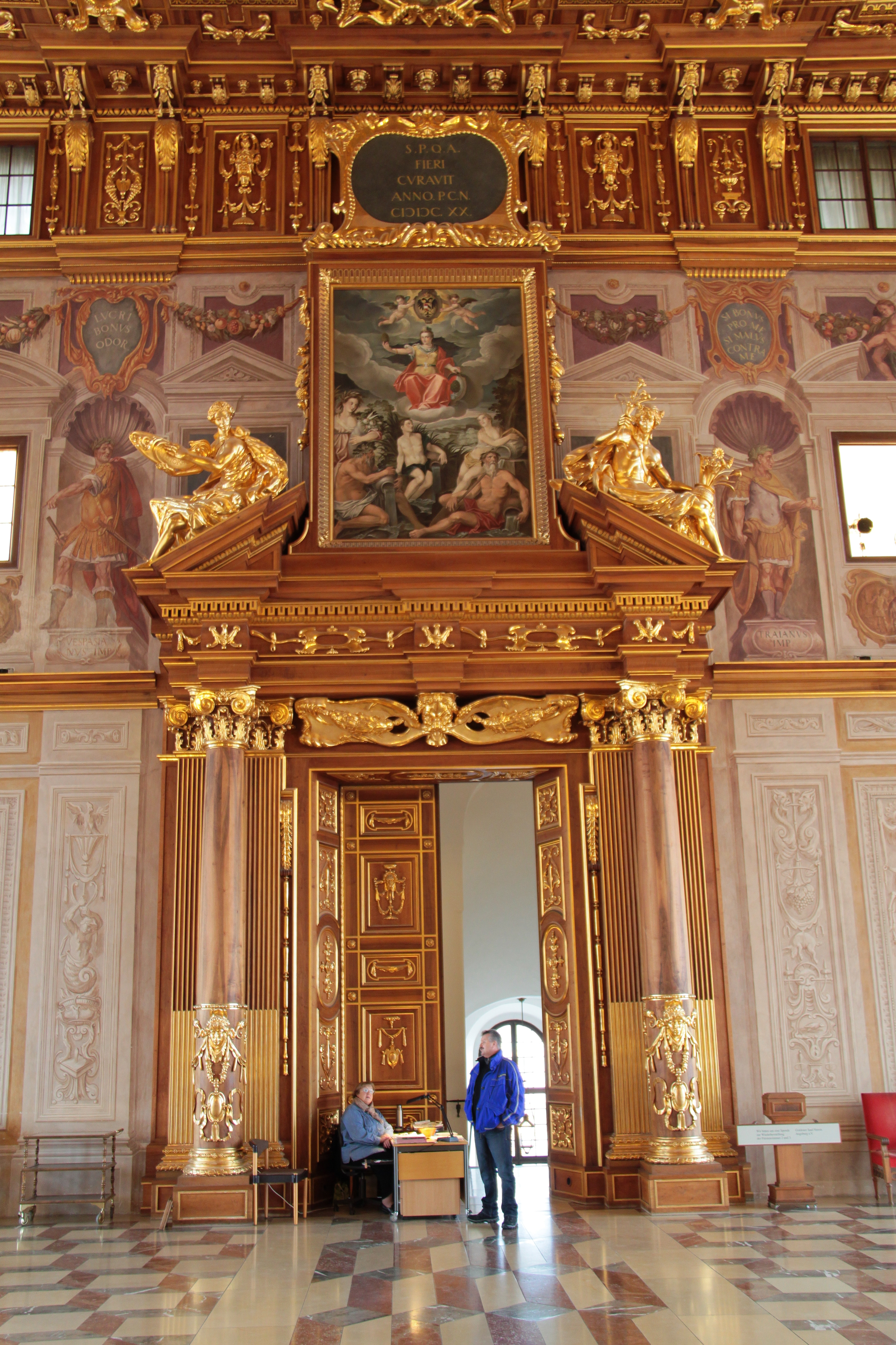 Impressionen Augsburg